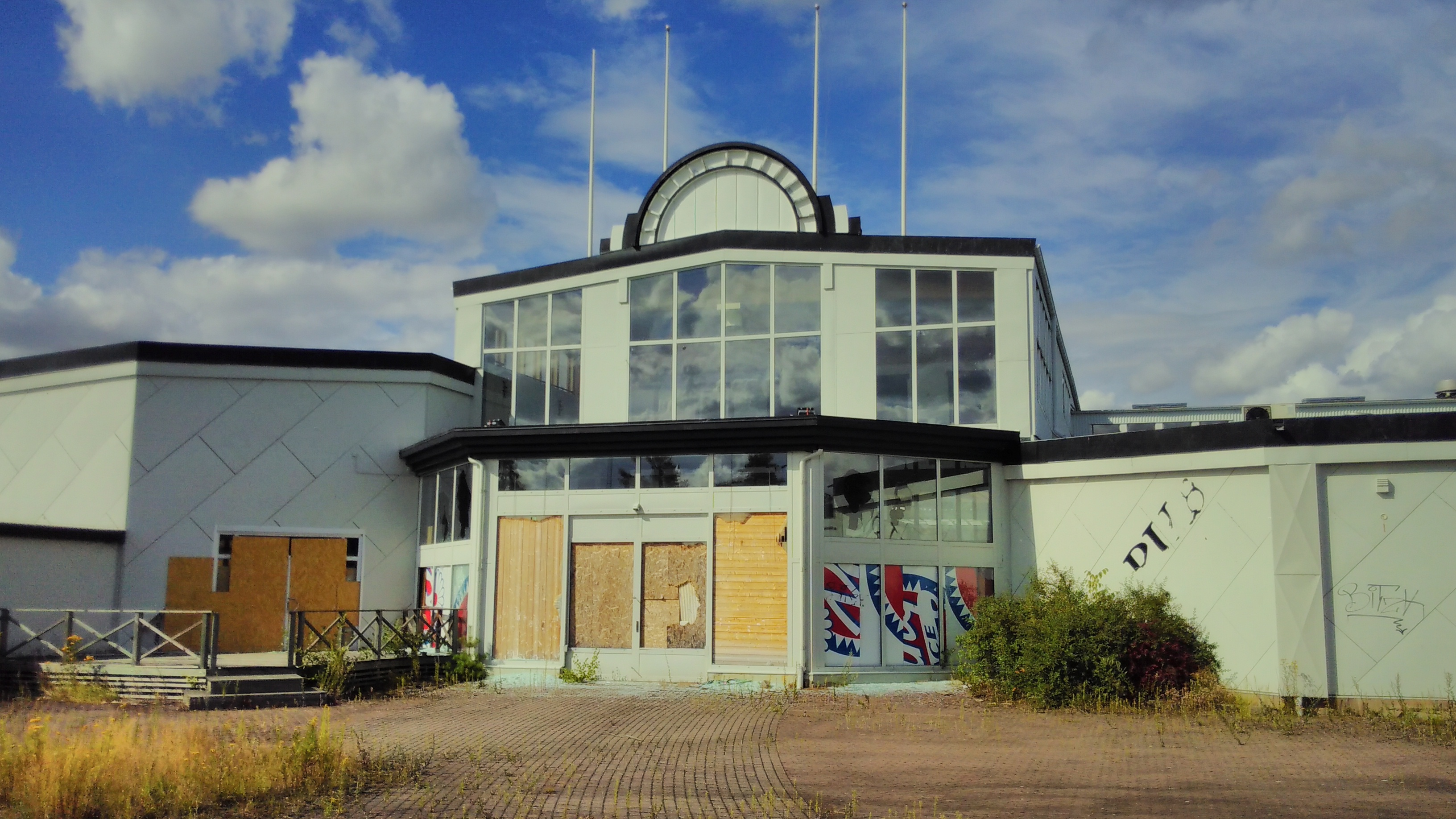 Ingången till Köpstaden i juli 2017 innan rivning.